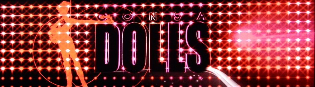 コンサドールズのロゴ